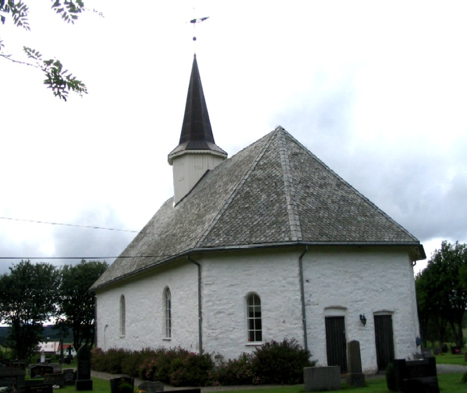 Rokke kirke og del av kirkegården sett fra nordøst